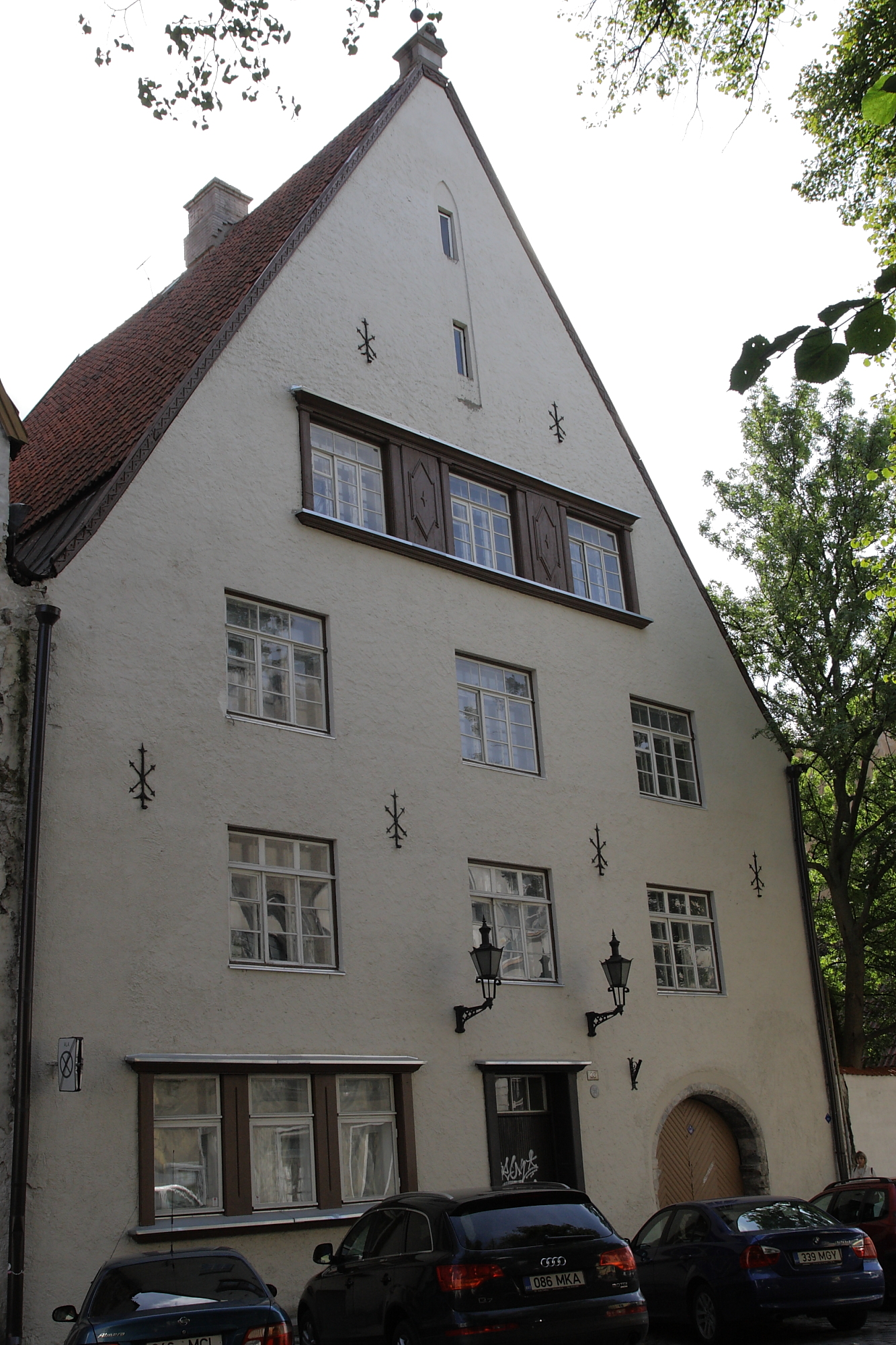 Maja, kus 1870.aastatel tegutses laulu- ja mänguselts "Estonia"